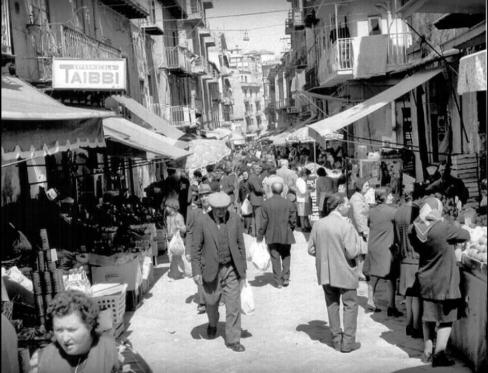 Strada a foglia a CL